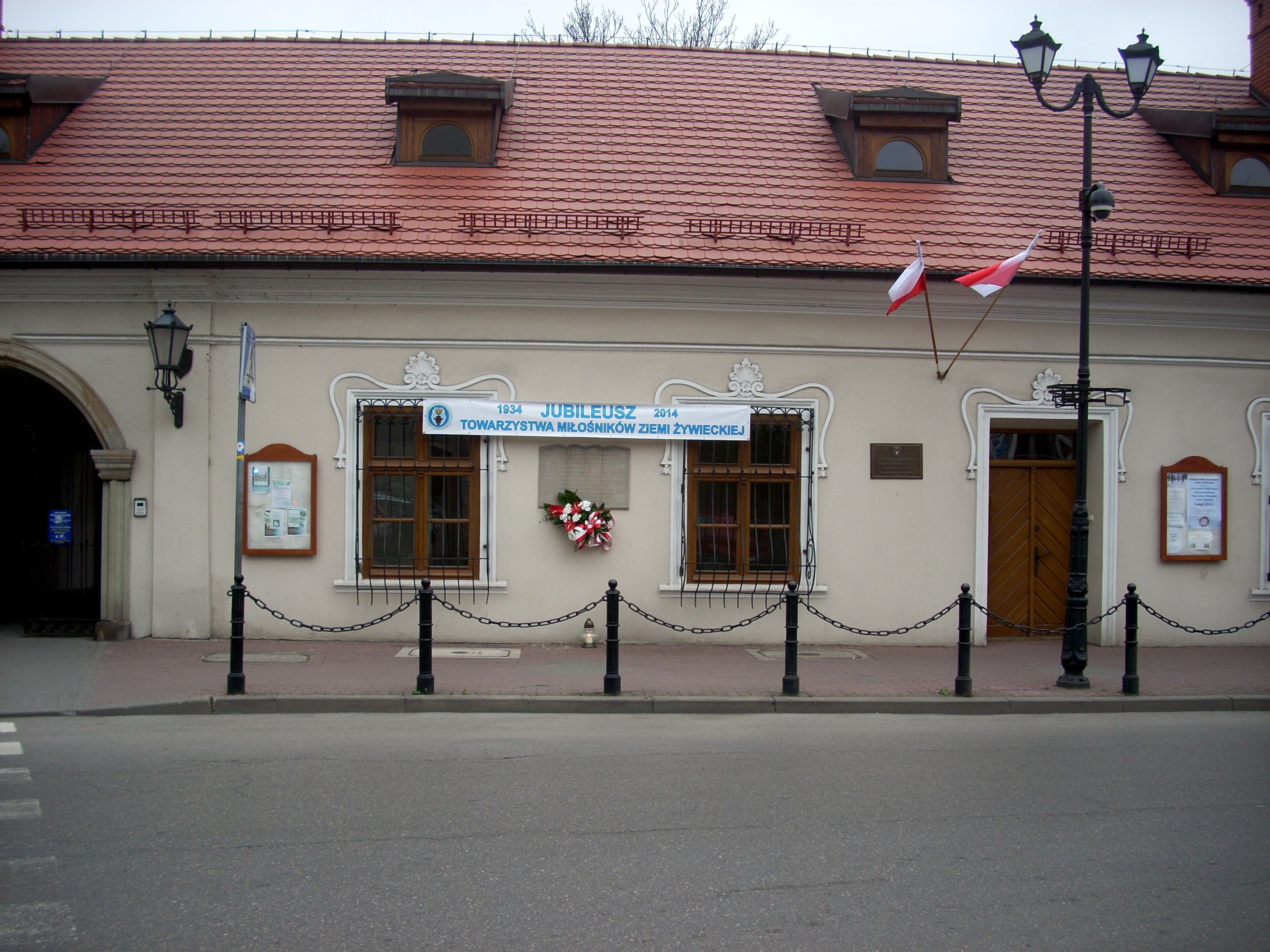 Siedziba TMZŻ ul. Zamkowa 4